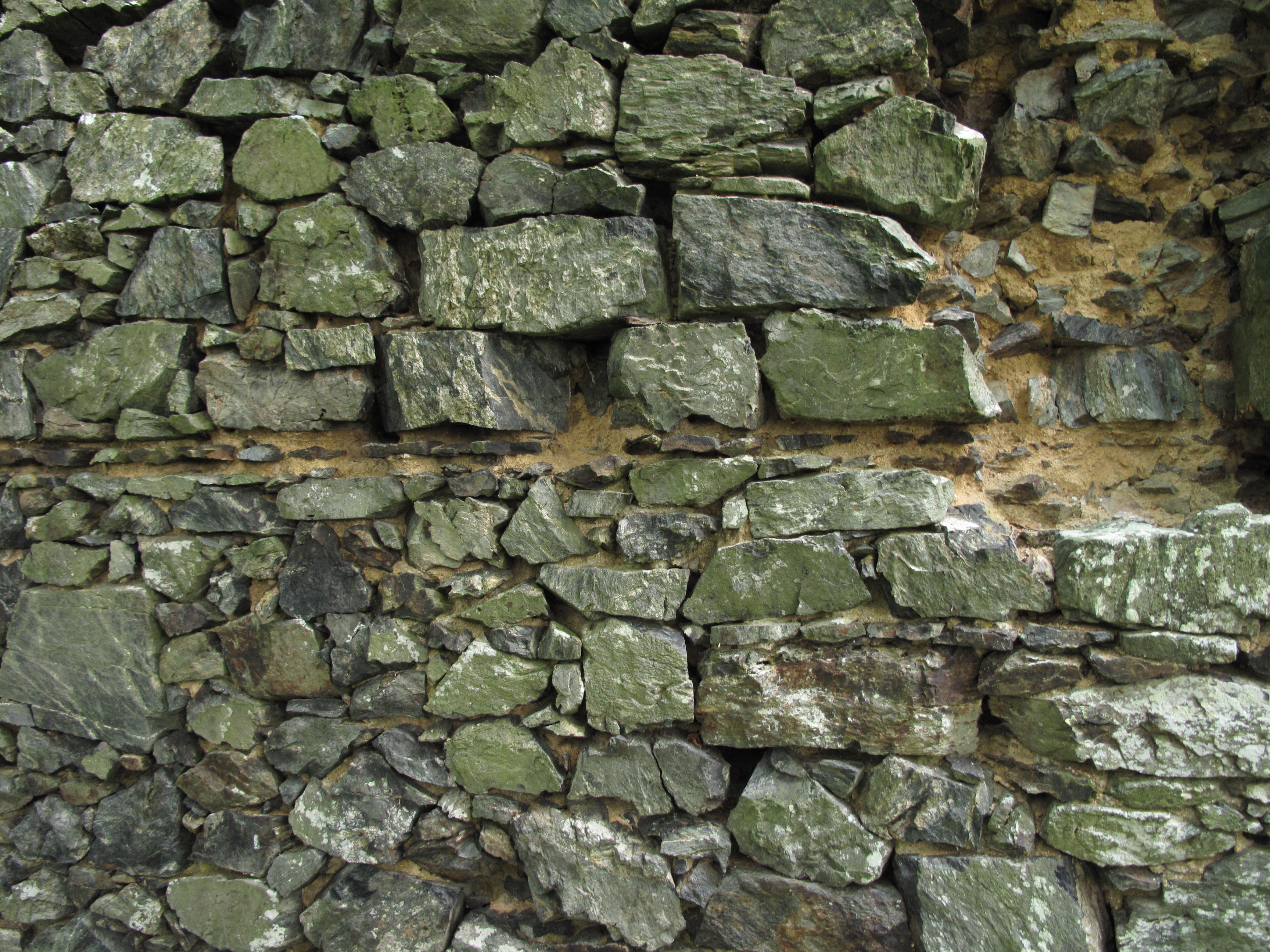 Přírodní rezervace Netřeb, okres Domažlice, Česká republika.